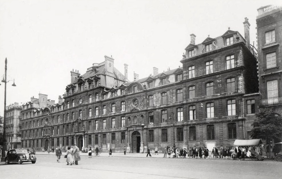 Lycée Montaigne à Bordeaux, avant-guerre, carte postale ancienne.